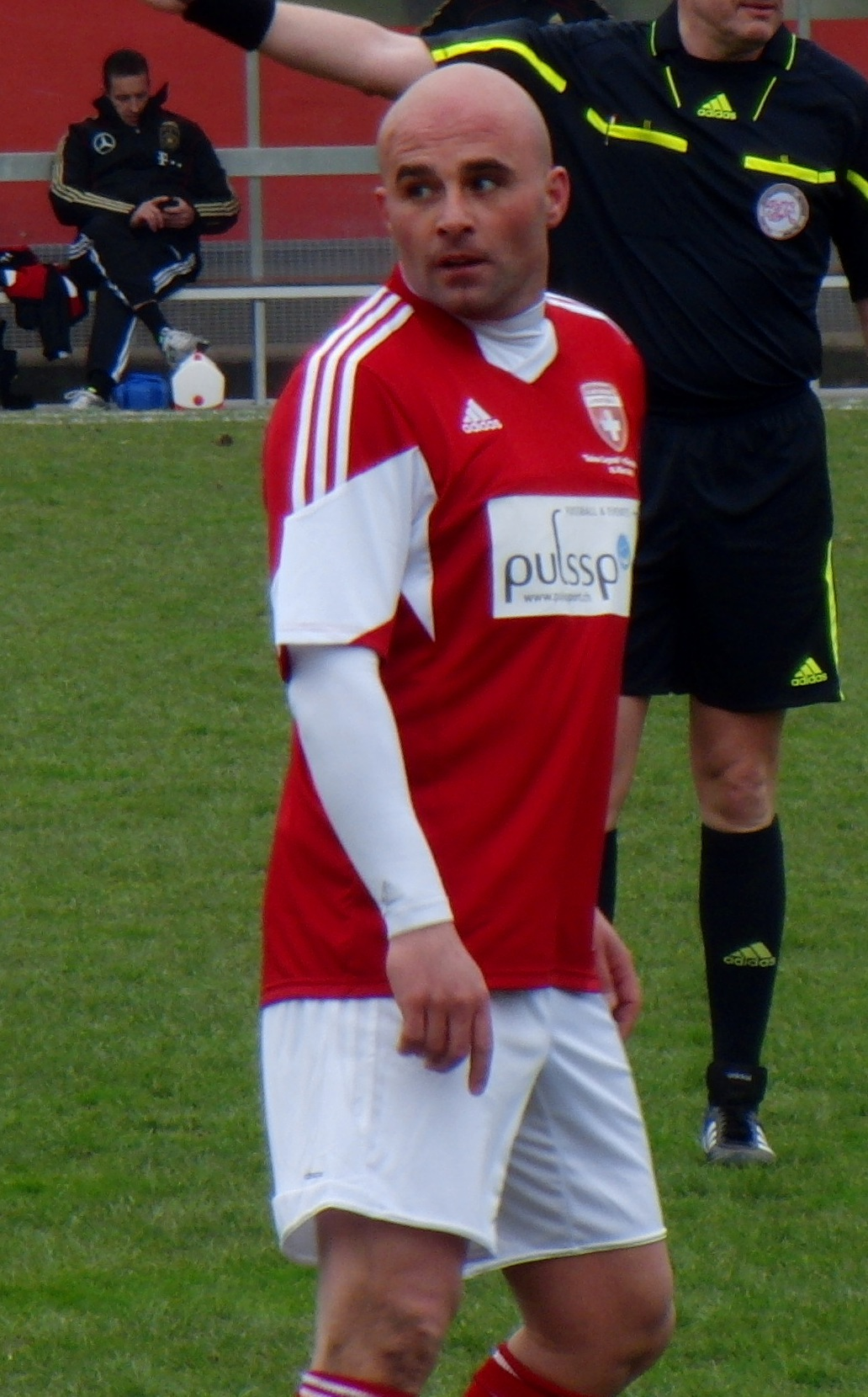 Giorgio Contini beim Legendenspiel Schweiz-Deutschland am 23. März 2013 auf der Schützenwiese in Winterthur.